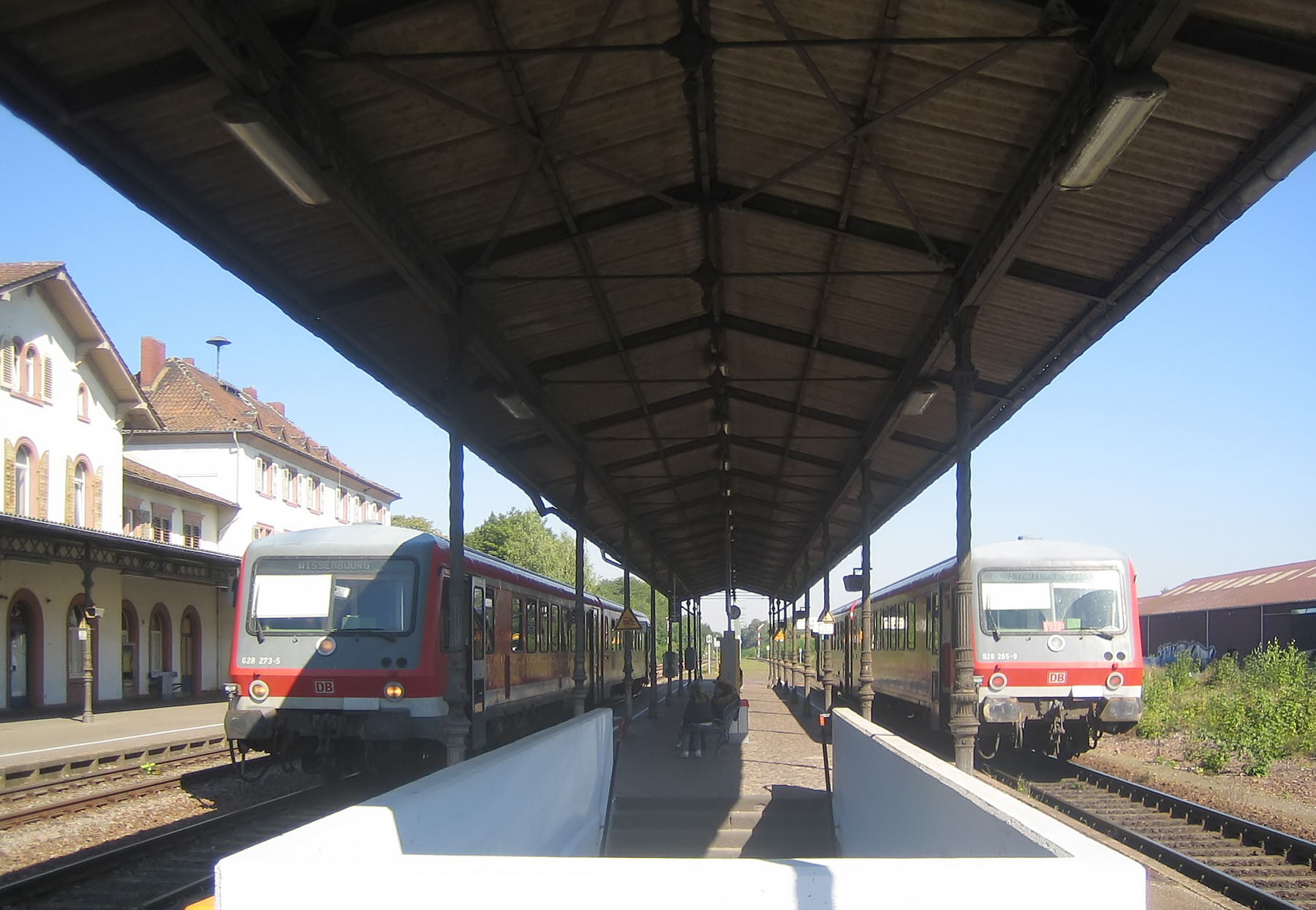 thumb|Original Bearbeitete Version von Image:Winden.JPG durch Smial: Schatten etwas aufgehellt, zugeschnitten, nachgeschärft Original-Beschreibung: (Uploaded by Benutzer:AF666) Beschreibung, Quelle und Lizenz Zugkreuzung in Winden, links eine RB nach Wissembourg, rechts eine RB nach Neustadt, selbst fotografiert Uploaded with Reworkhelper